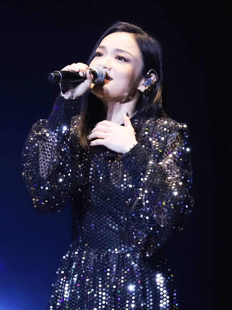 听到了lala的现场~ (2018 咪咕音乐盛典 上海 徐佳莹)